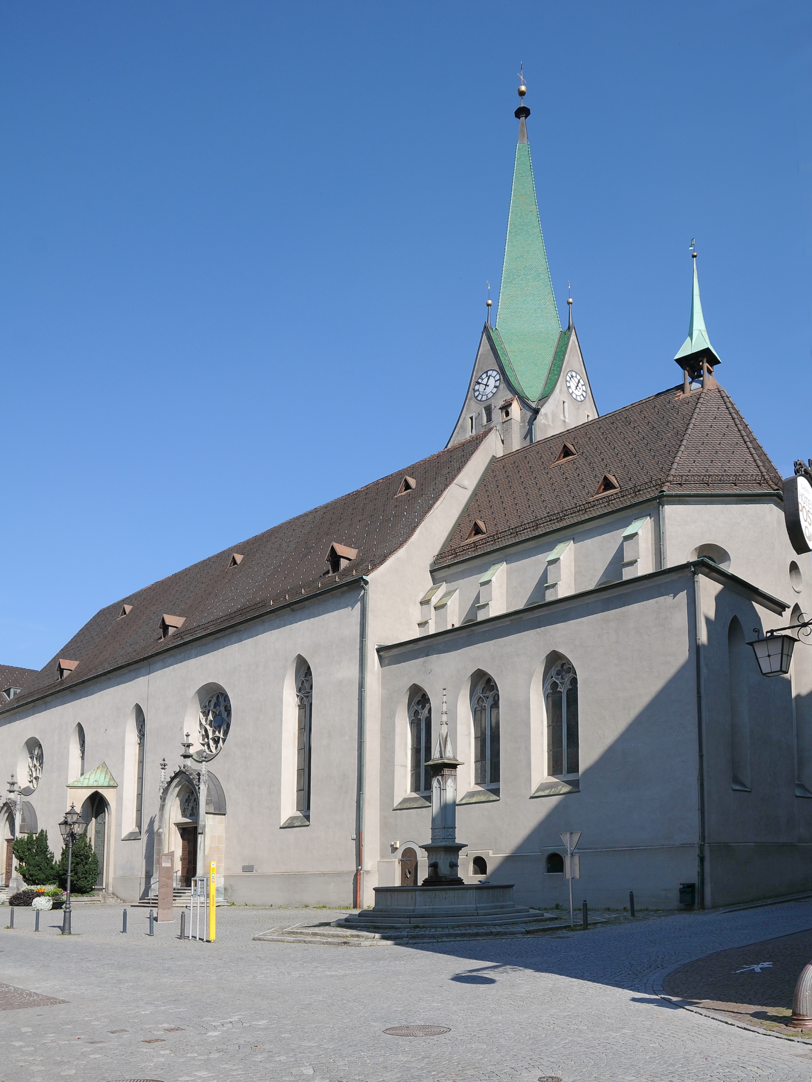 Dom St. Nikolaus (Feldkirch) am Domplatz Nr.2 in Feldkirch.